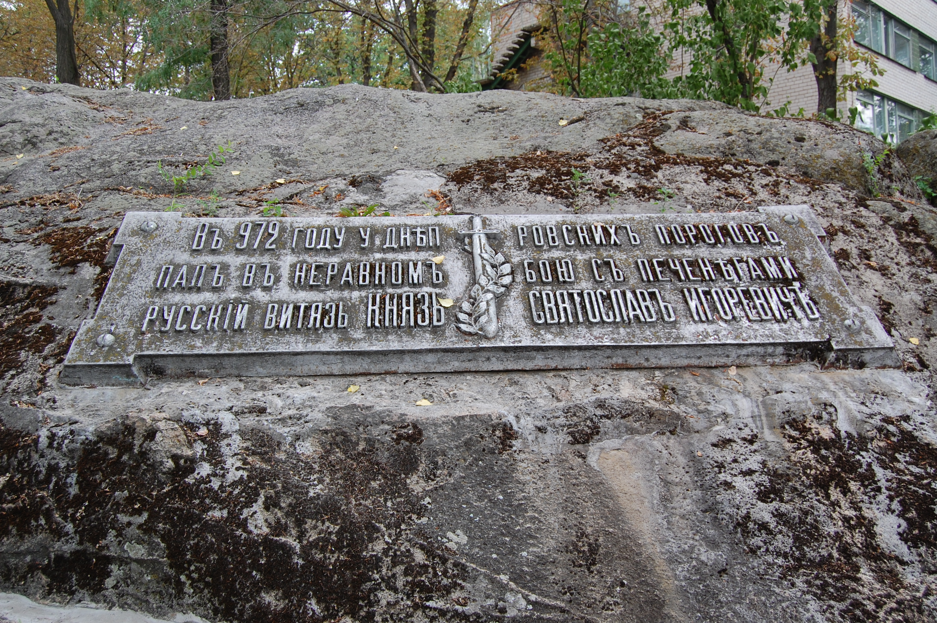 с.Никольское-на-Днепре. Памятная плита на месте гибели князя Святослава Игоревича. В народе-Камень Святослава.